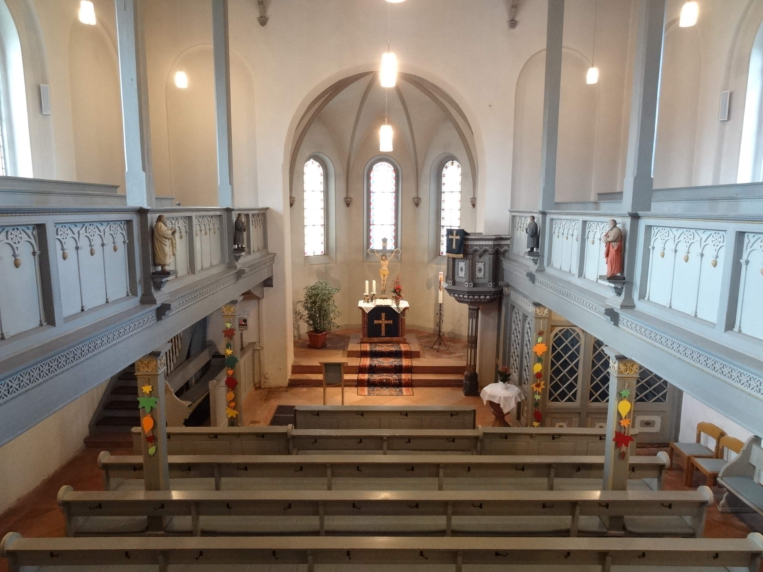 Evangelische Pfarrkirche Langd